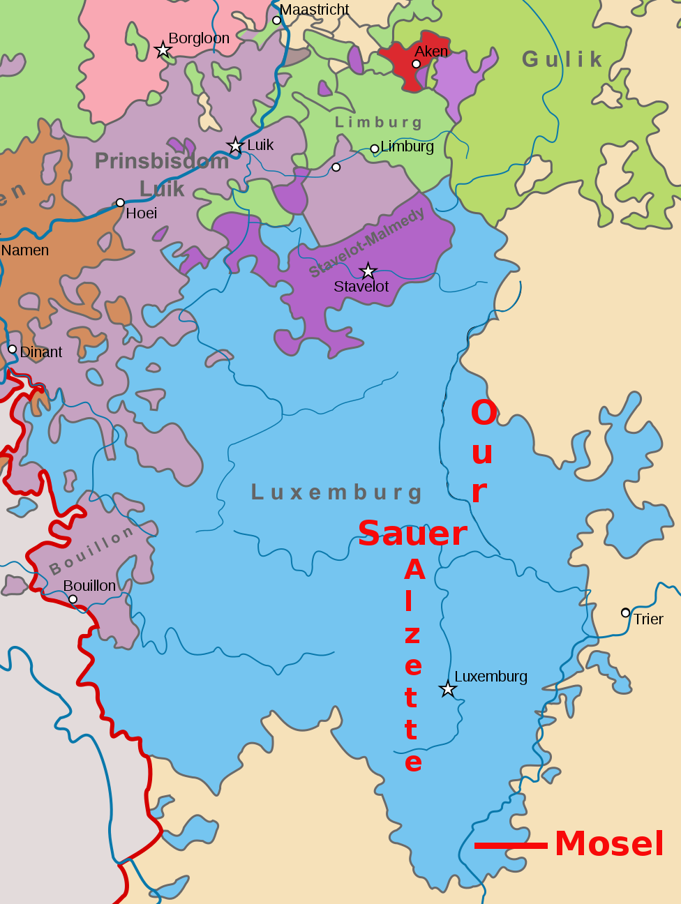 von Süden nach Norden: die Alzette von Westen nach Osten: die Sauer von Norden noch Süden: die Our in der Südostecke: die Mosel